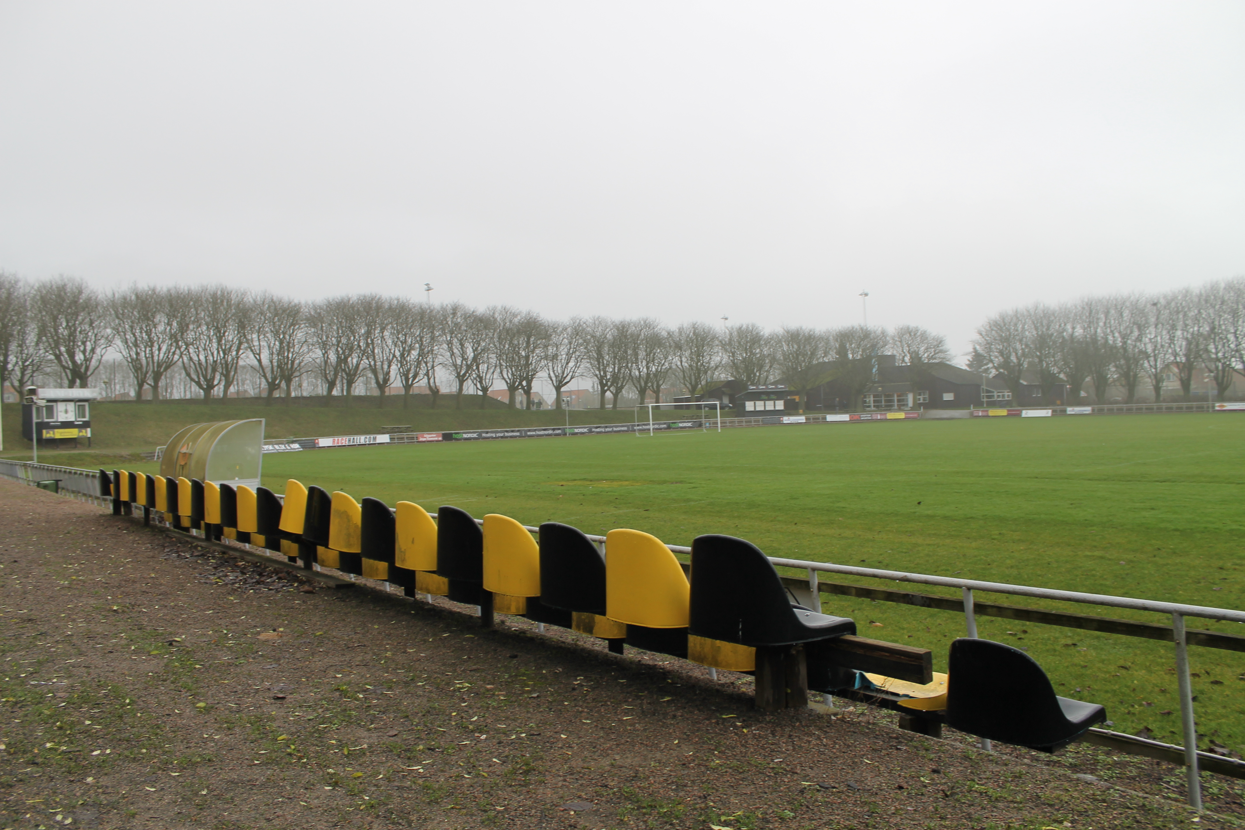 Riisvangen Stadion november 2012